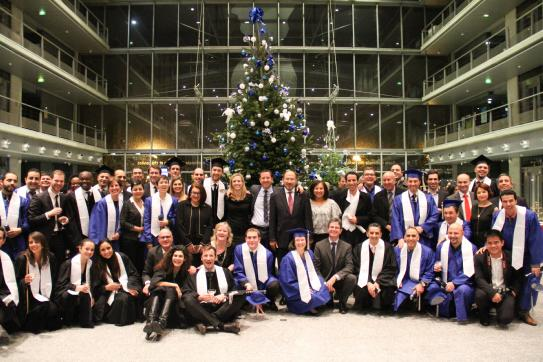 Une promotion du MBA de l'École des Ponts.